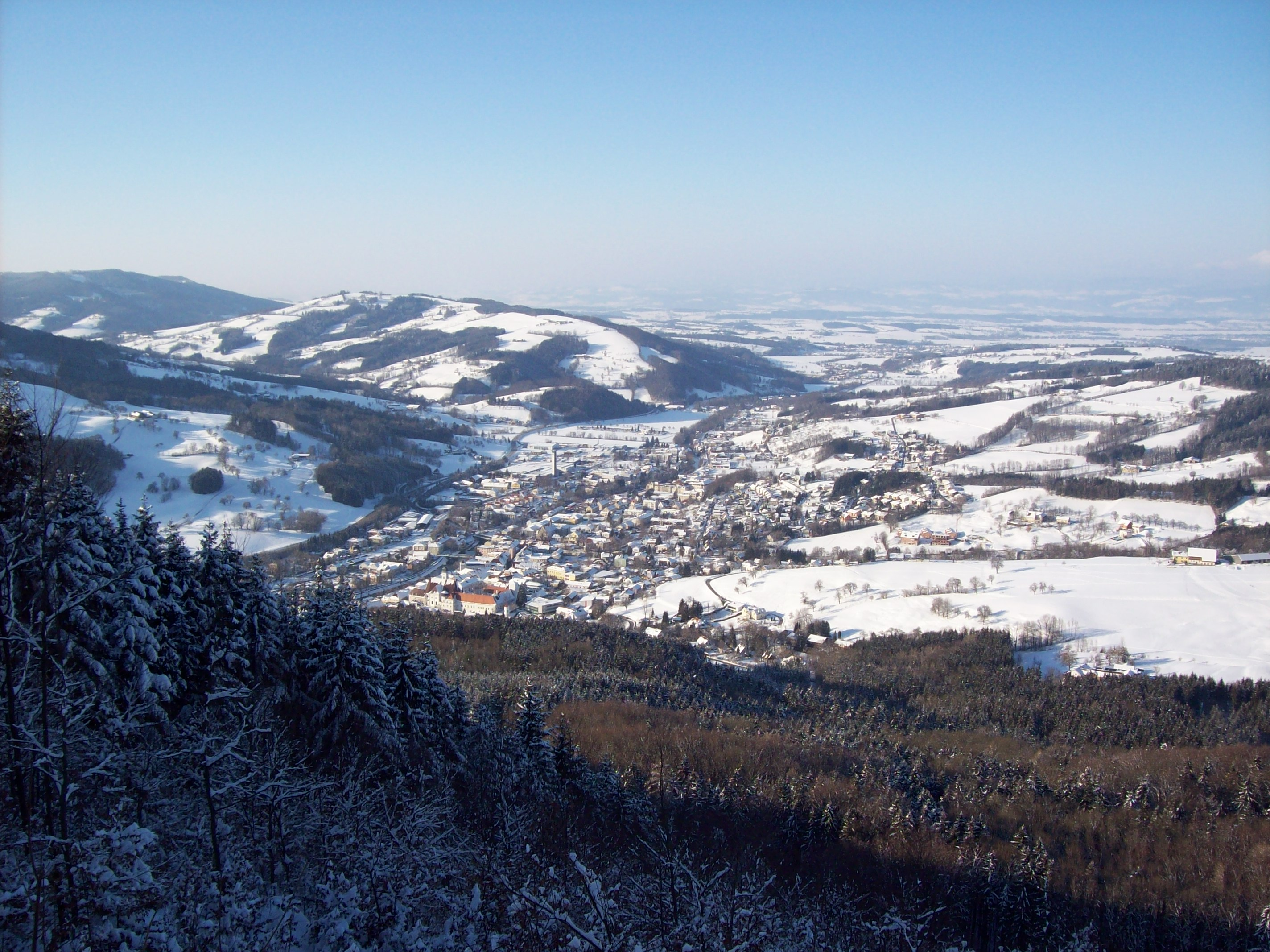 Blick auf Scheibbs vom Blasenstein Richtung Nordwest.